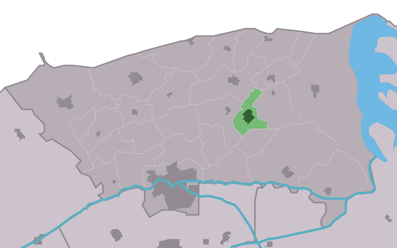 Kaartsje fan himrik fan Mitselwier